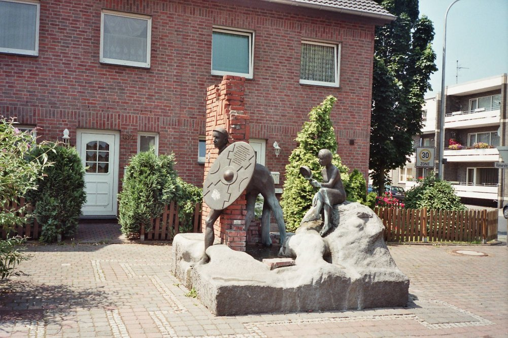 Denkmal für das römische Lager Asciburgium in Moers